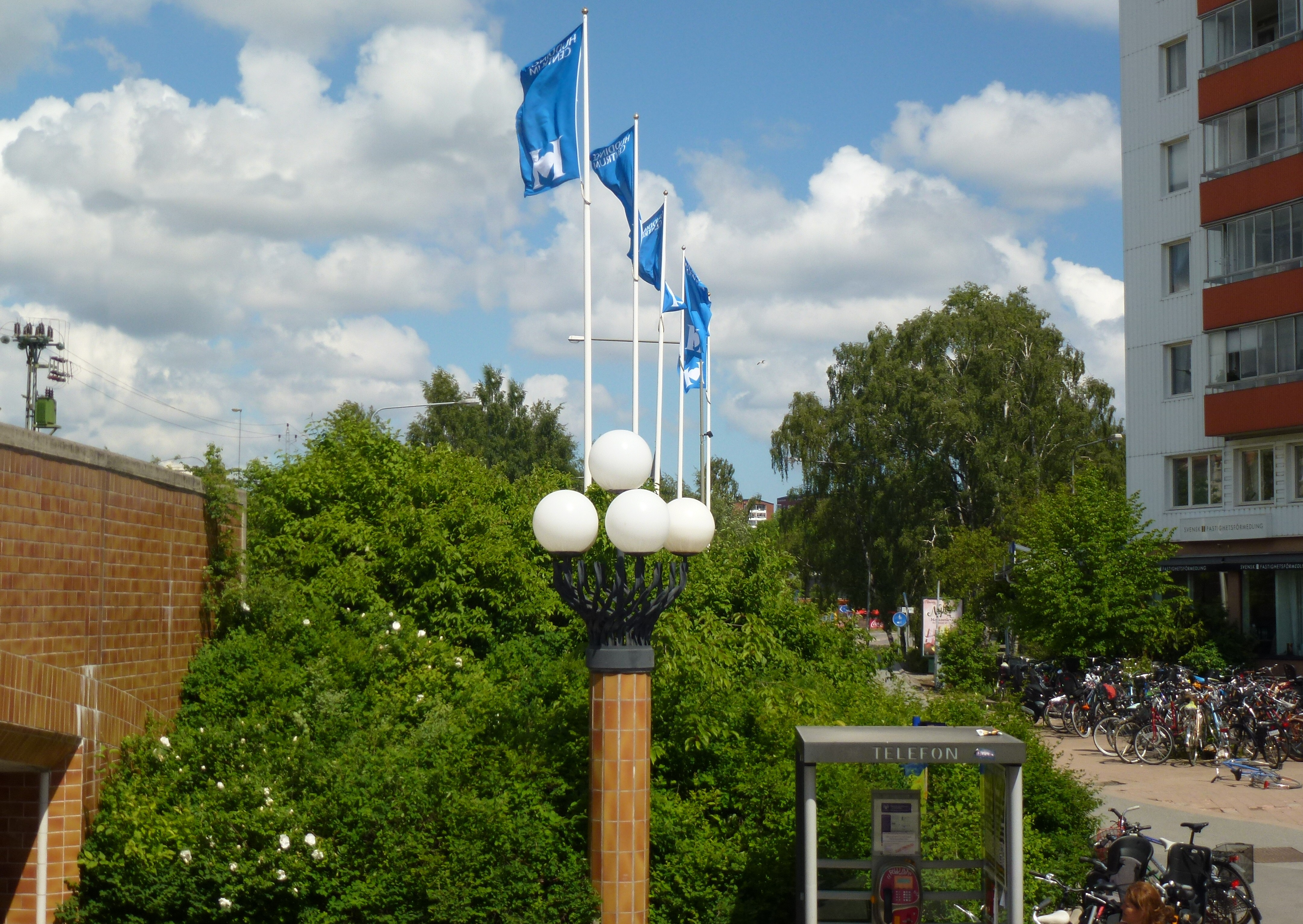 Huddinge centrum vid tågstationen